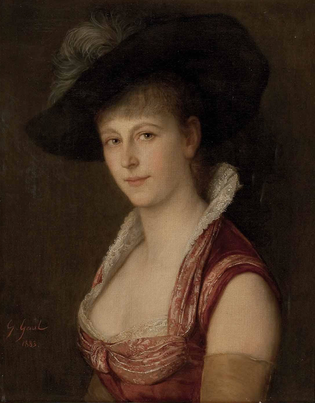 Portrait der Primaballerina Bertha Linda, der zweiten Gemahlin Hans Makarts